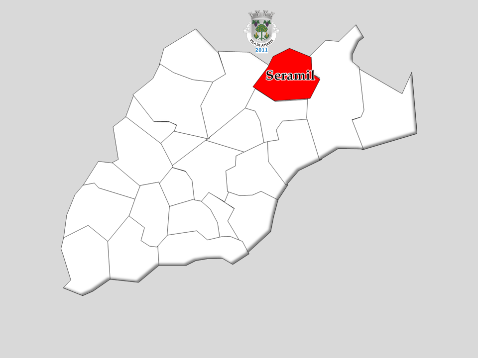 Censo 2011